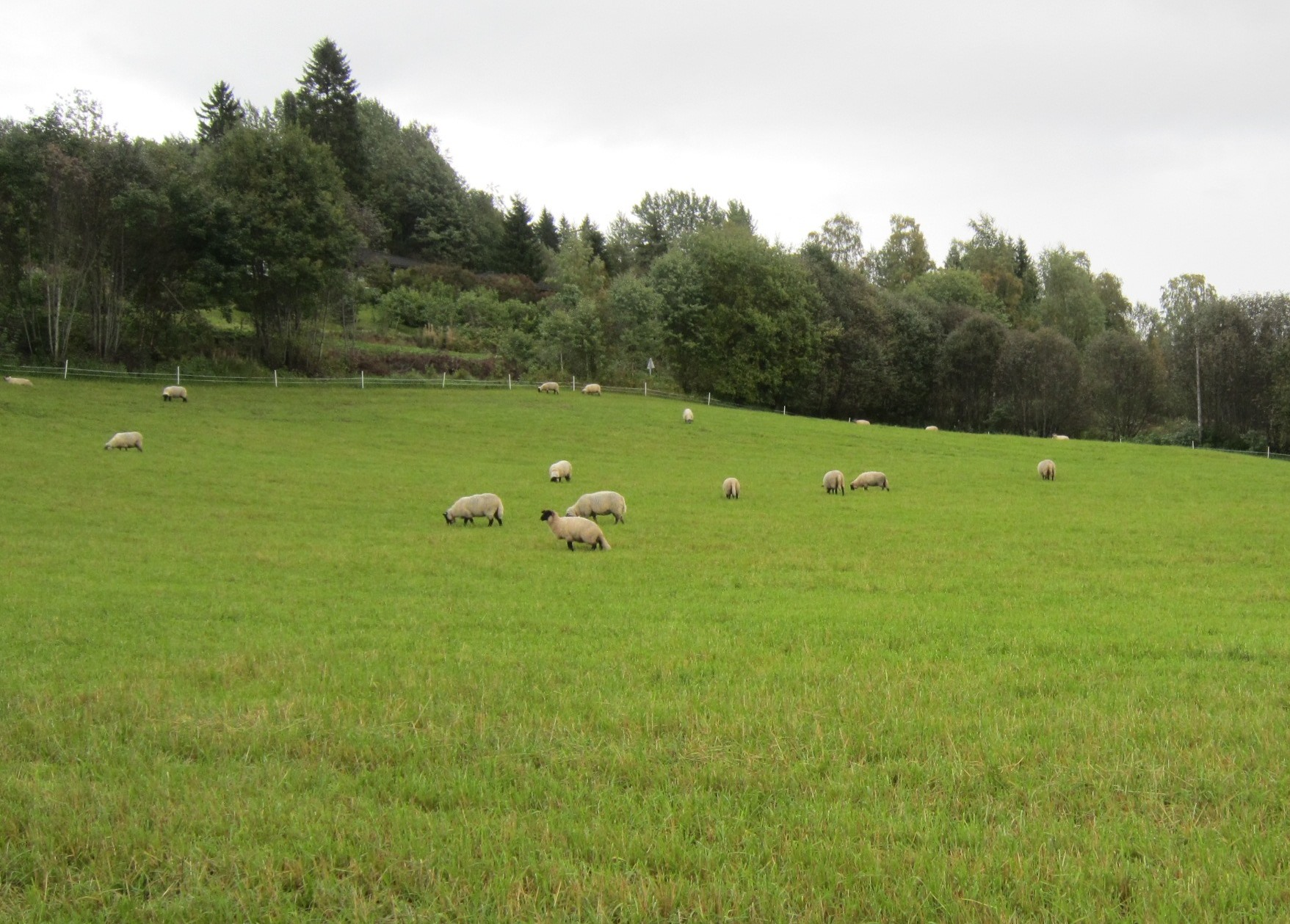 Kirkejordet ved Bleken midtre i Rudsbygd. Her stod en gang Bleken stavkirke.